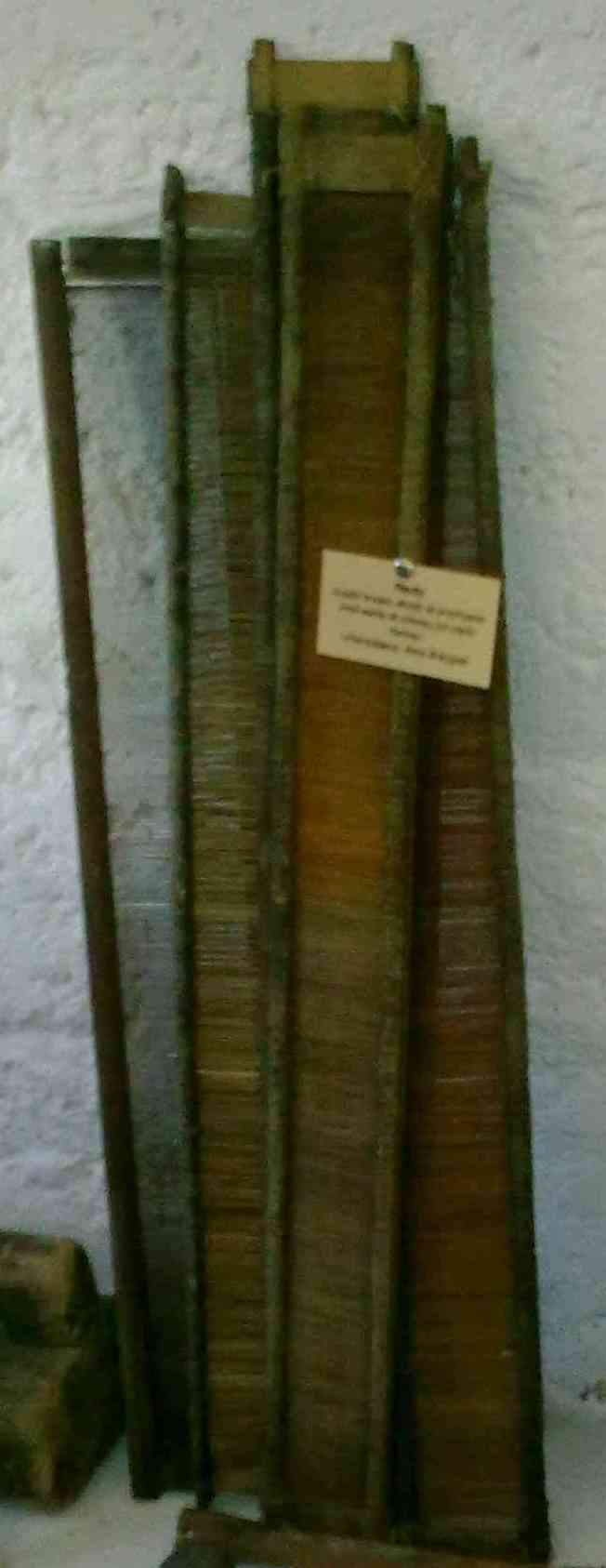 Płochy smołowe. Części krosien, służące do przybijania nitek wątku do krawędzi tkaniny. Izba regionalna w Turtulu. Ofiarodawca: Anna Brezgieł